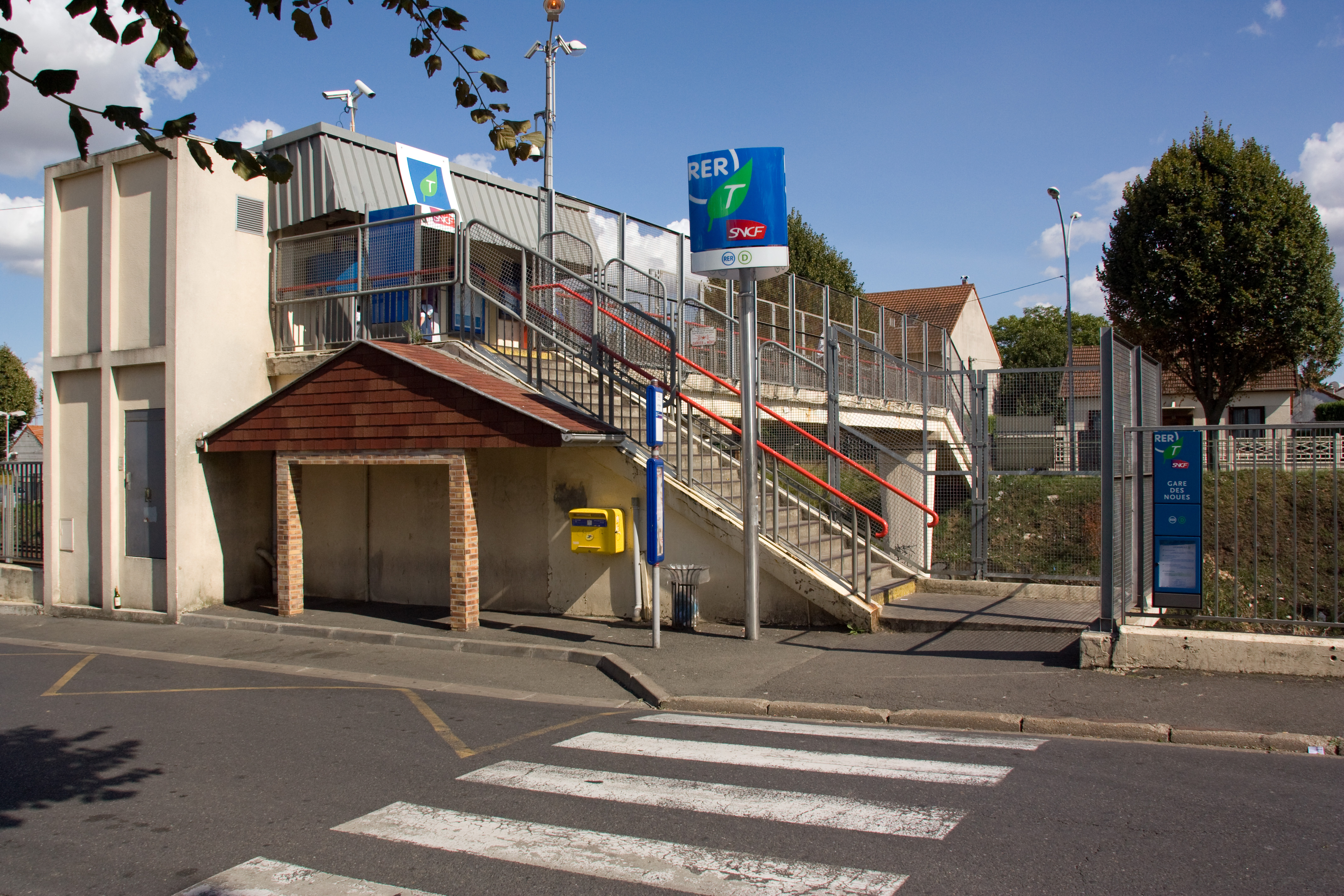 La Gare de Les Noues, département du Val-d'Oise, France